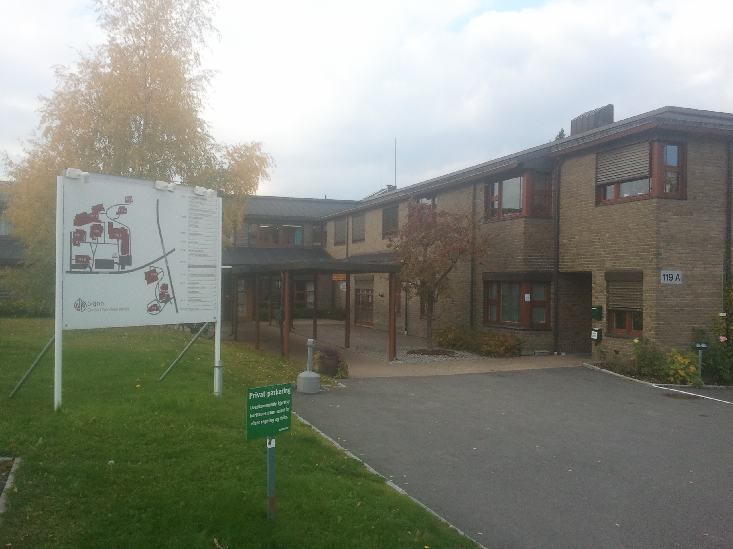 Conrad Svendsen senter, ved hovedinngangen